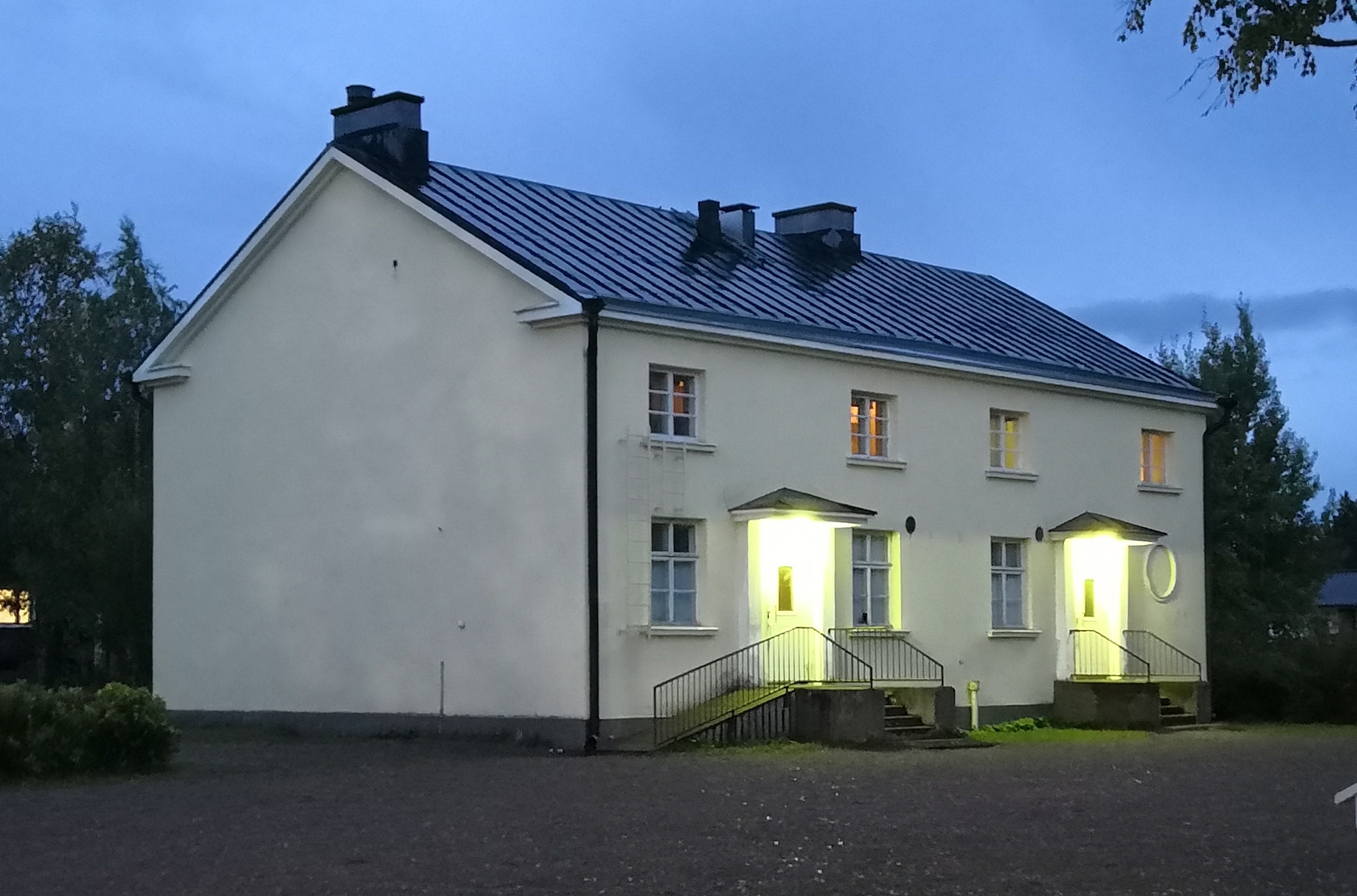 Korian koulun kivikoulu iltahämärässä